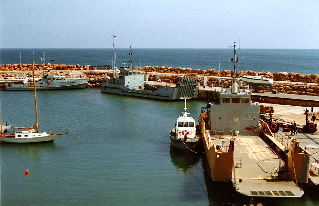 10 Port Squadron RCT, Akrotiri Cyprus